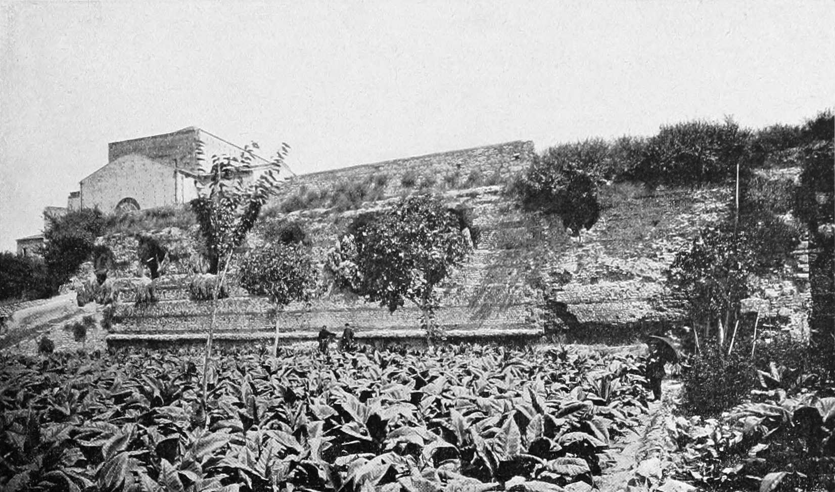 Il criptoportico dei Santi Quaranta a Benevento. Almerico Meomartini, Benevento, Bergamo, Istituto Italiano d'Arti Grafiche, 1909